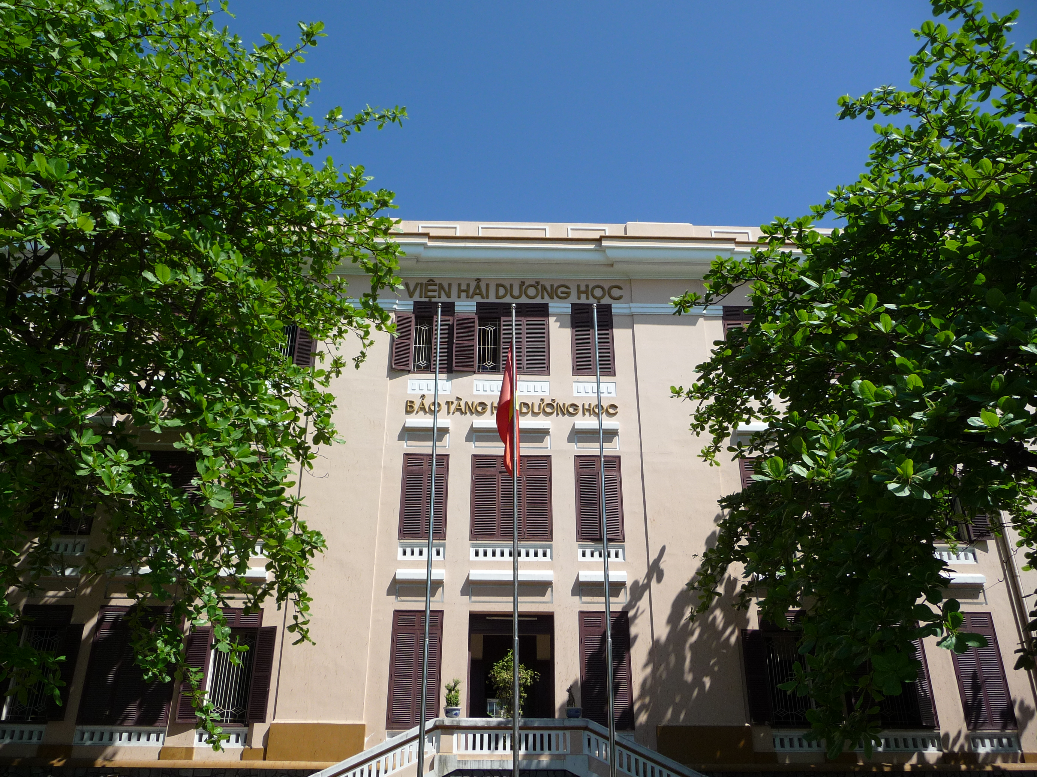 2009年撮影